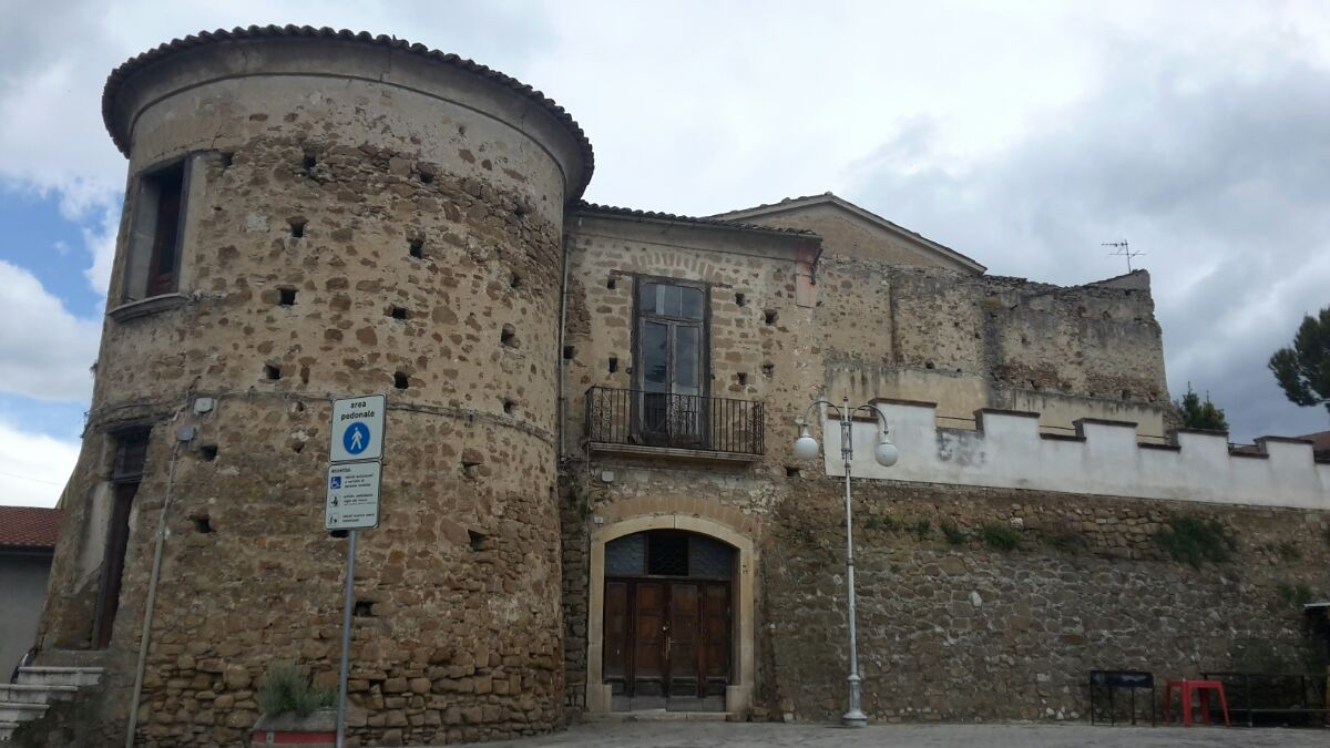 Castello del paese di Bonito, in provincia di Avellino.